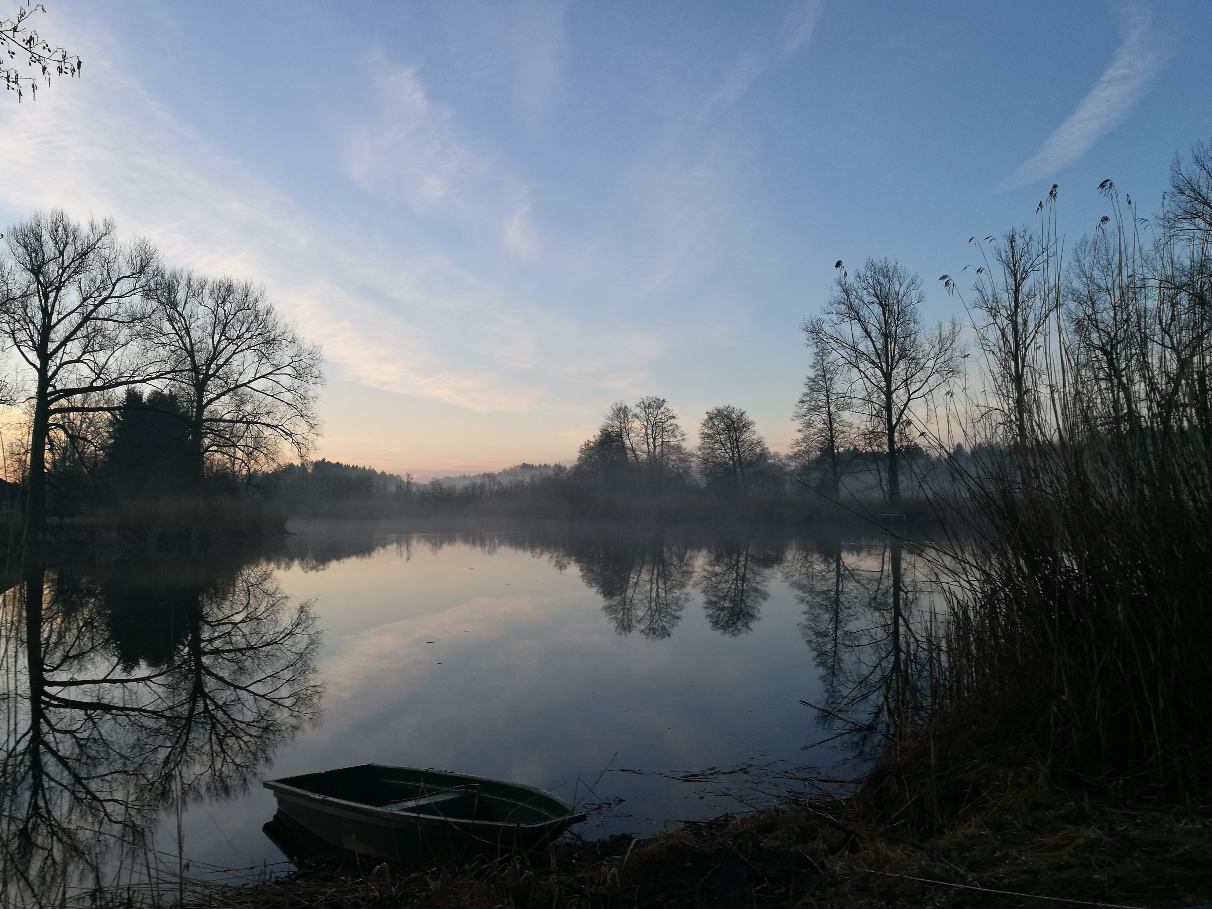 Deutschland (D) - Baden-Württemberg (BW) - Landkreis Ravensburg (RV) - Stadt "Aulendorf" - Ortsteil "Tannhausen" - Wohnplatz "Haslach": Haslacher Weiher